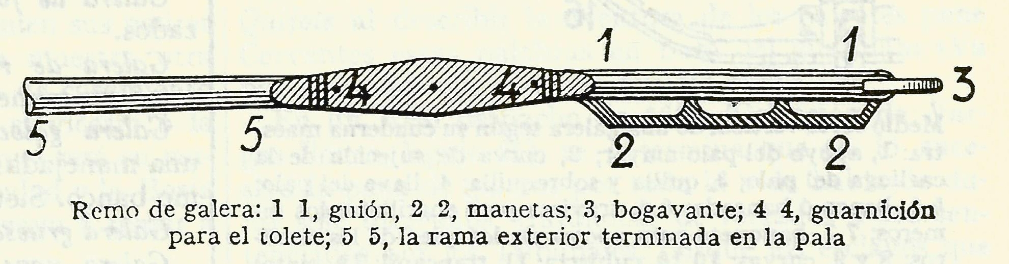 Esquema de un remo de galera, con el nombre de las distintas partes que lo componían.